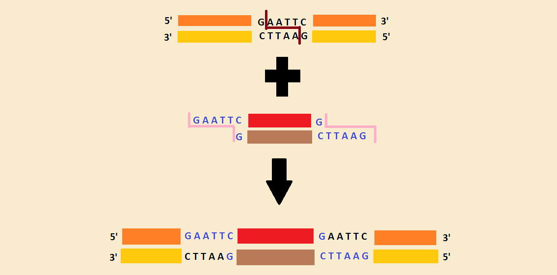 COM ACTUEN ELS ENZIMS DE RESTRICCIÓ